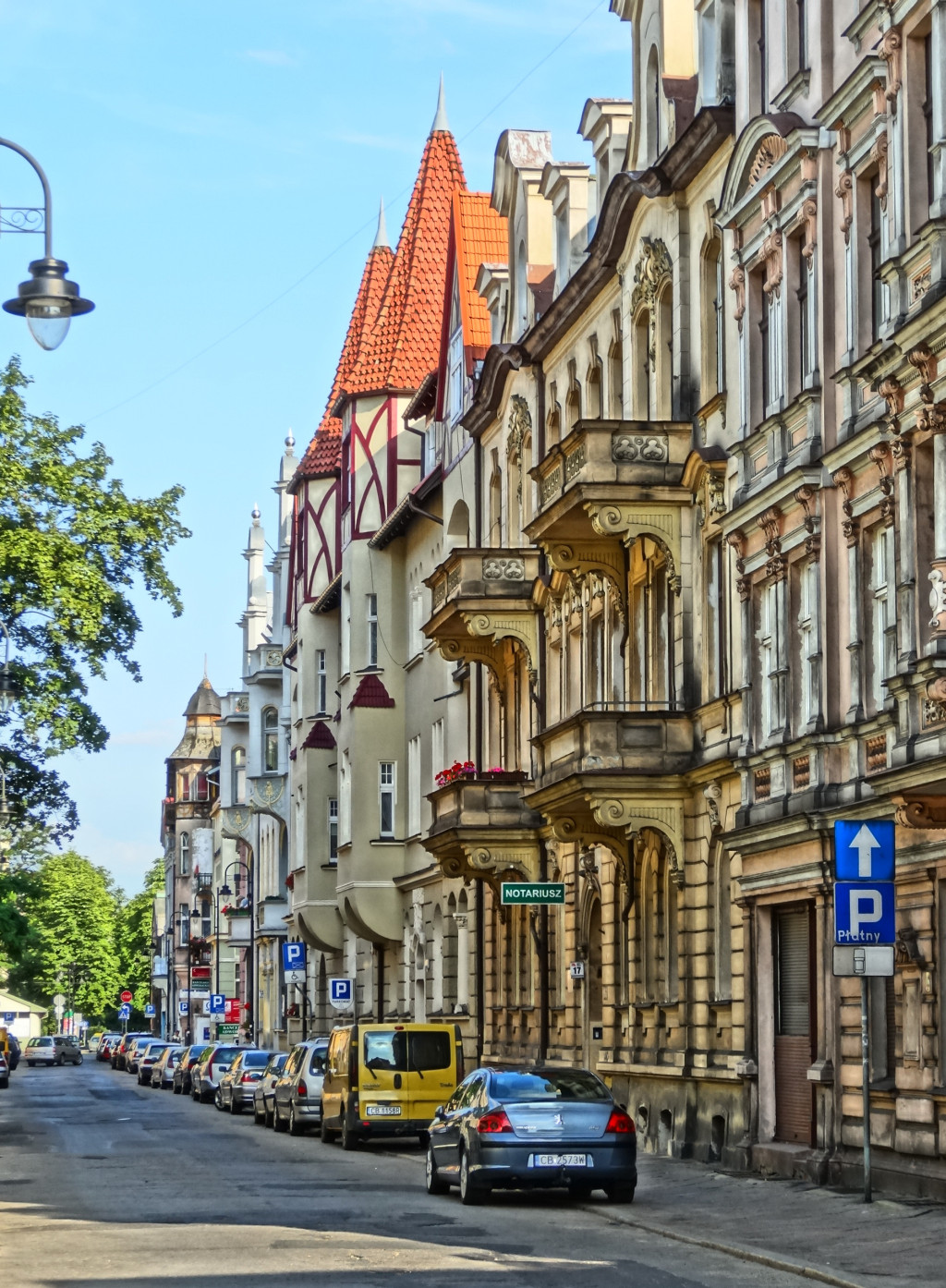 Ulica Augusta Cieszkowskiego w Bydgoszczy – pierzeja południowa